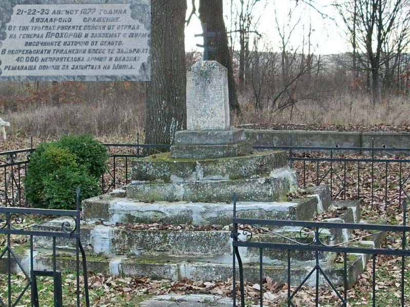 Паметникът, посветен на загиналите руски войници в сраженията през лятото на 1877 г. в покрайнините на село Аязлар (дн. Светлен).